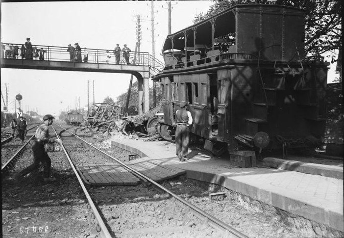 Accident ferroviaire de Houilles du 9 octobre 1920, épaves des voitures.